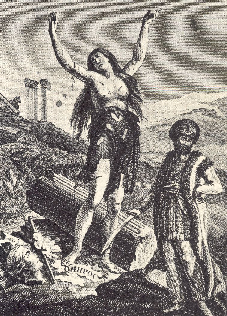 Από το Σάλπισμα Πολεμιστήριον του Αδαμάντιου Κοραή (1801). Λεζάντα: ὤ μοι ἐγὼ πανάποτμος, ἐπεὶ μ' ἕλε δούλιον ἦμαρ.